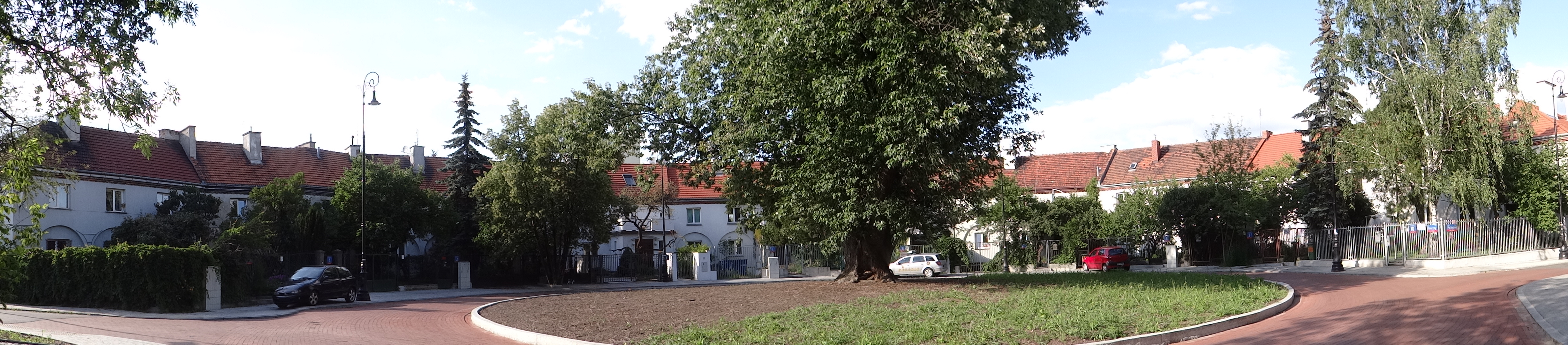 Plac Słoneczny w Warszawie na Żoliborzu - panorama